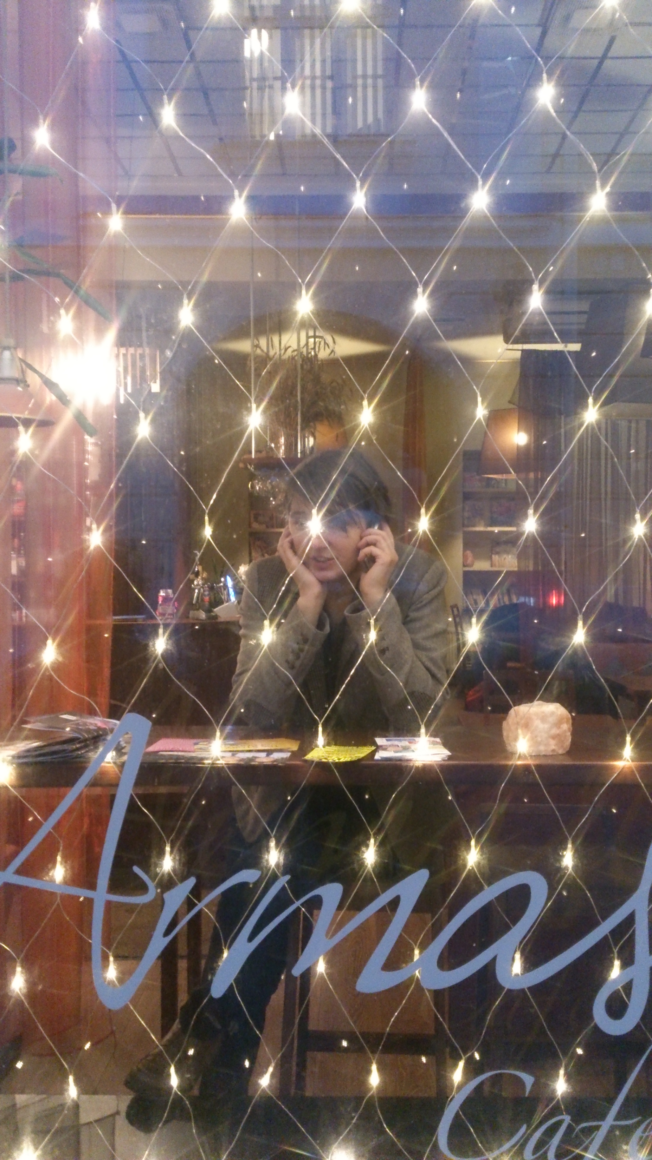 Rael Artel, Tartu Kunstimuuseumi direktor 2015. aastal